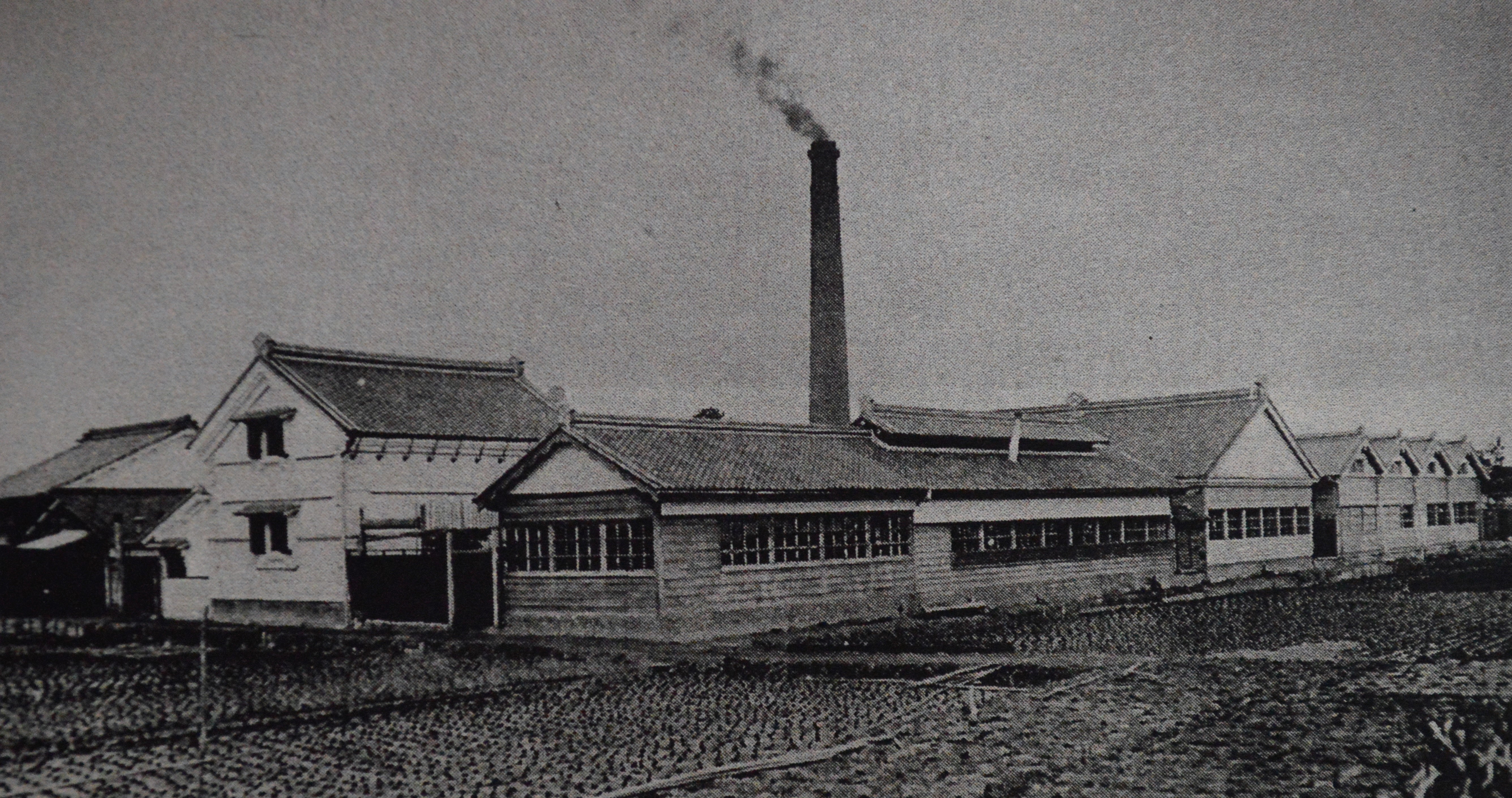 大正時代初期の片岡毛織。